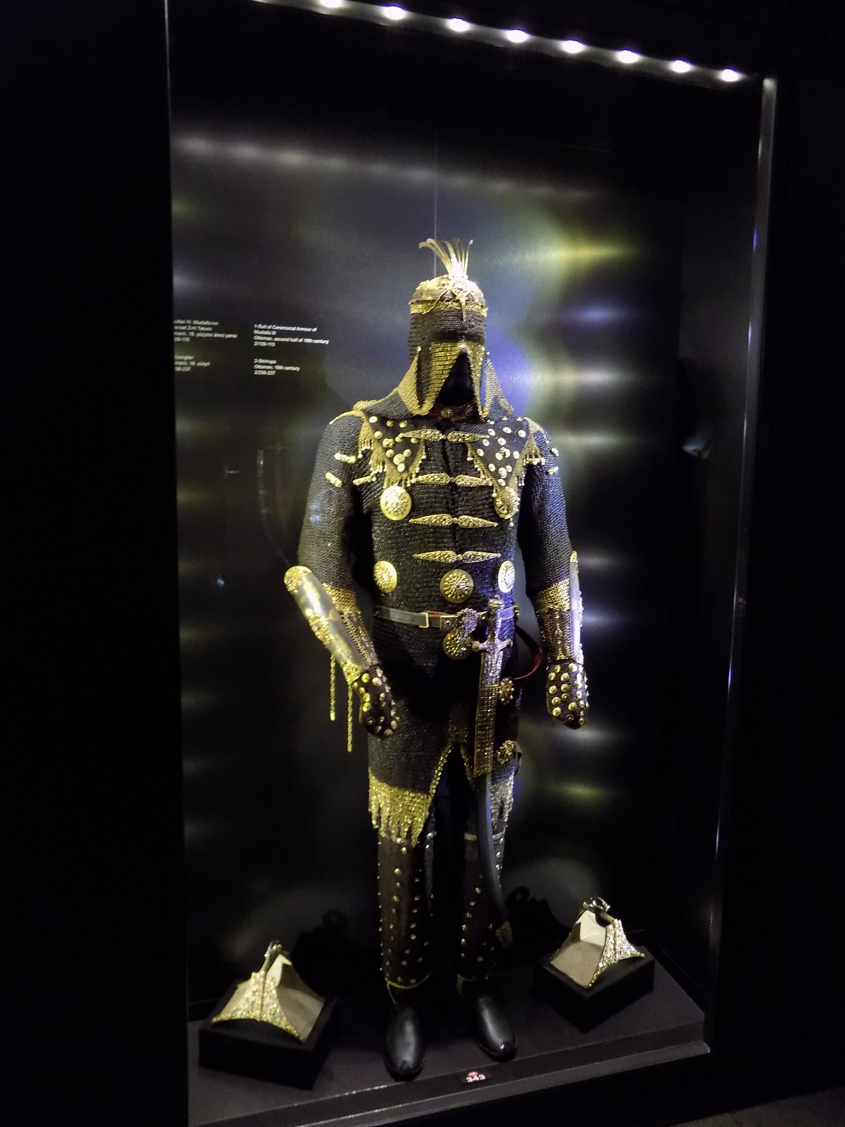 Topkapı Sarayı Müzesinde sergilenen III. Mustafa'nın tören zırhı.